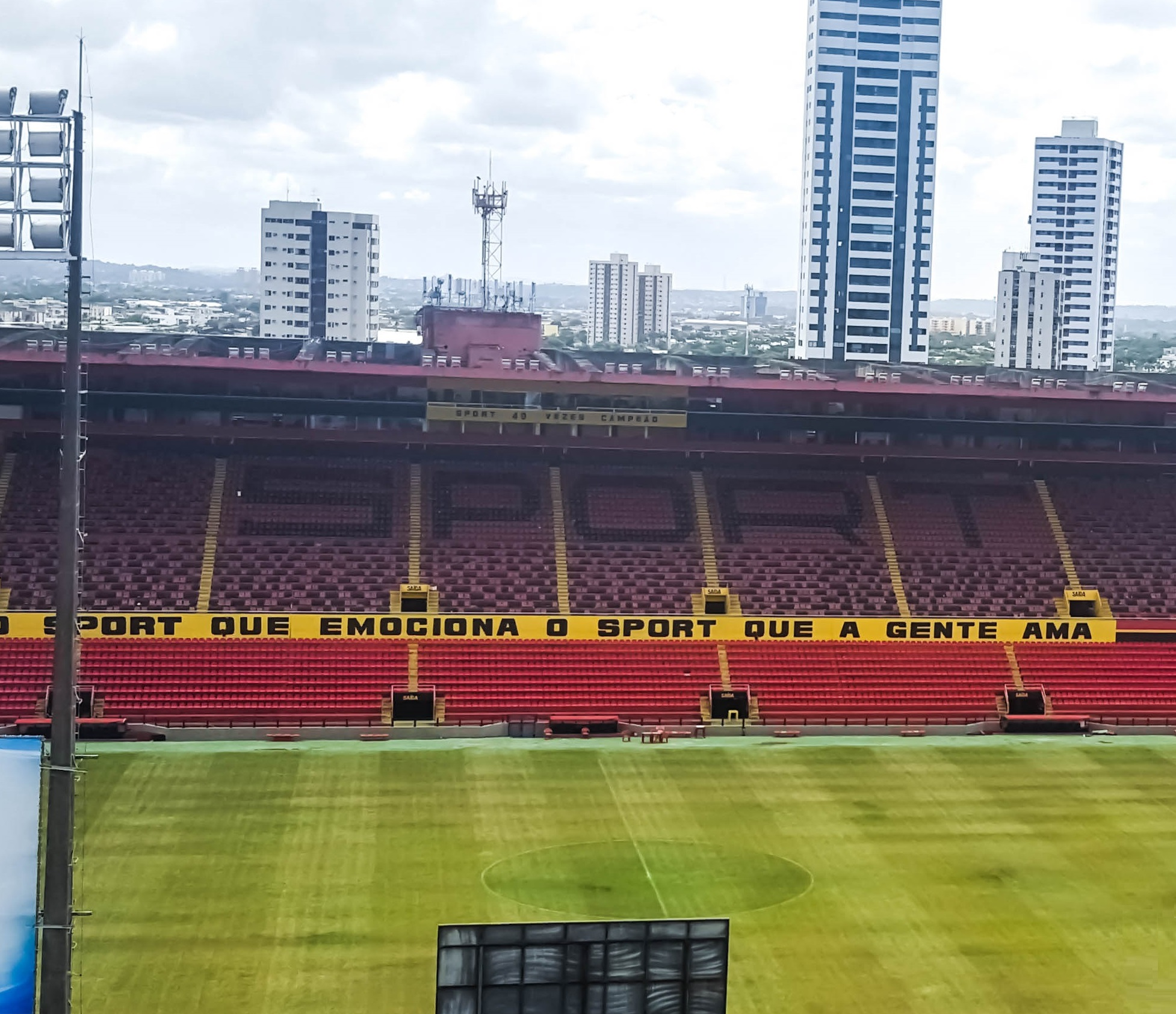 Vista frontal das sociais da Ilha do Retiro.